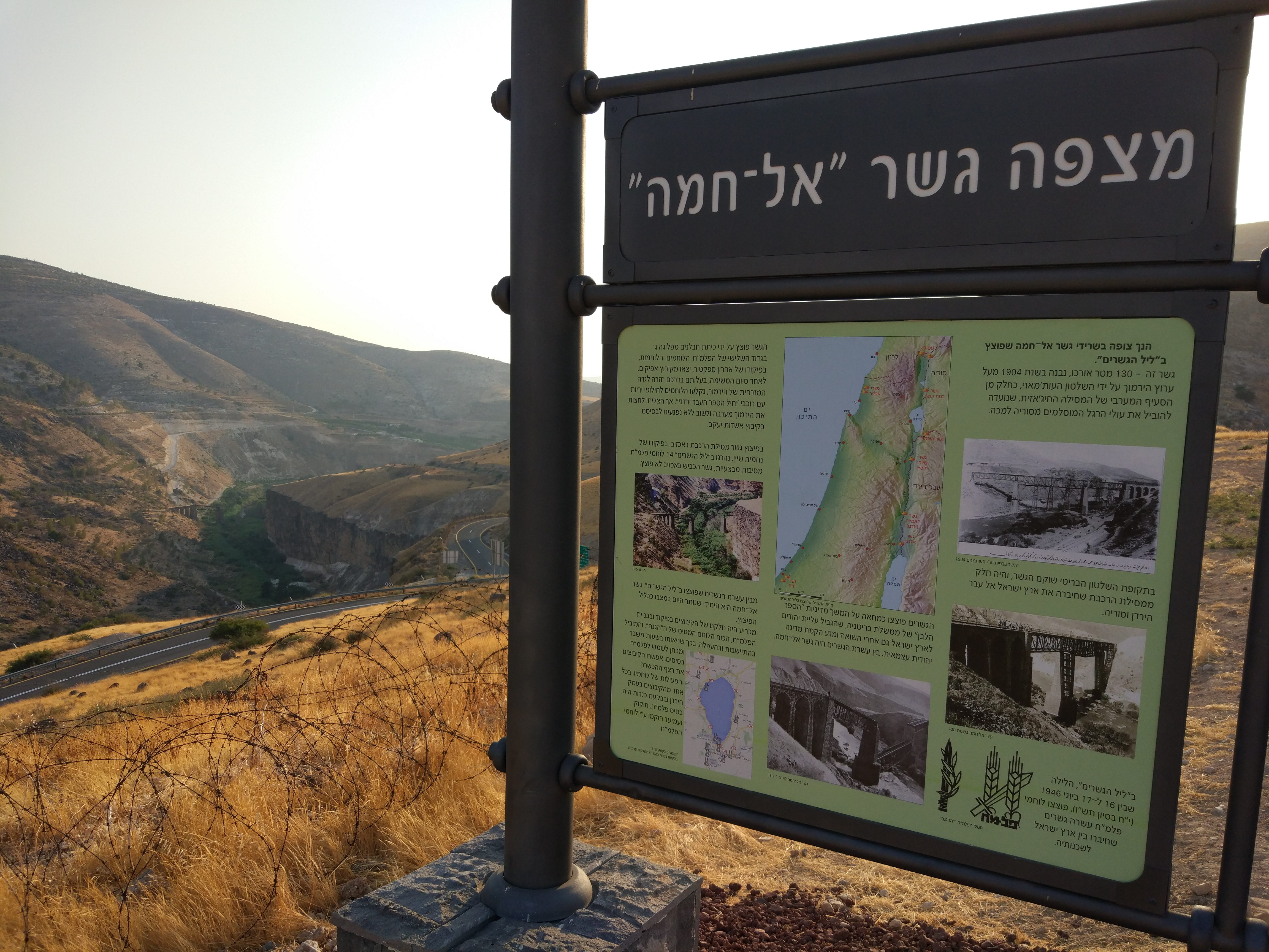 השלט במצפור גשר אל-חמה והגשר ההרוס ברקע